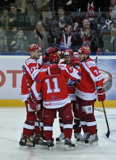 Lokototiv 5 - 1 Atlant